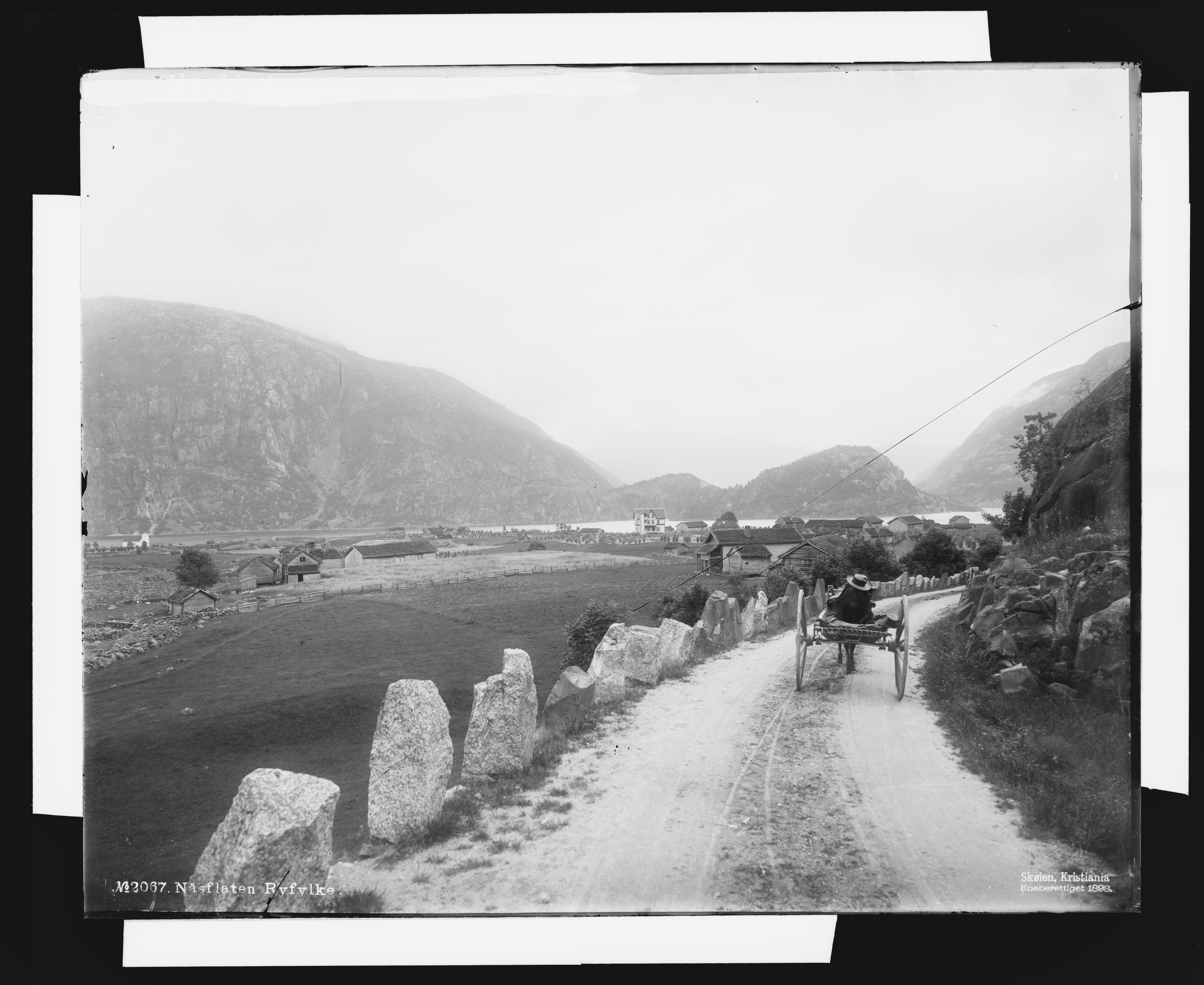 Påskrift negativ: No2067. Näsflaten Ryfylke Skøien, Kristiania Eneberettiget 1898. Påskrift negativ: 247 Nesflaten [Riksantikvaren] Påskrift konvolutt: B-247 Suldal Nesflaten Skøien 2067 Kra 1898[Riksantikvaren] [Negativet er eksponert med speilvendt resultat. Rettet opp.] Sted: Nesflaten,Ryfylke,Suldalsvatnet Kommune: Suldal Fylke: Rogaland Tagger: landskap vei hest og vogn kantsteiner